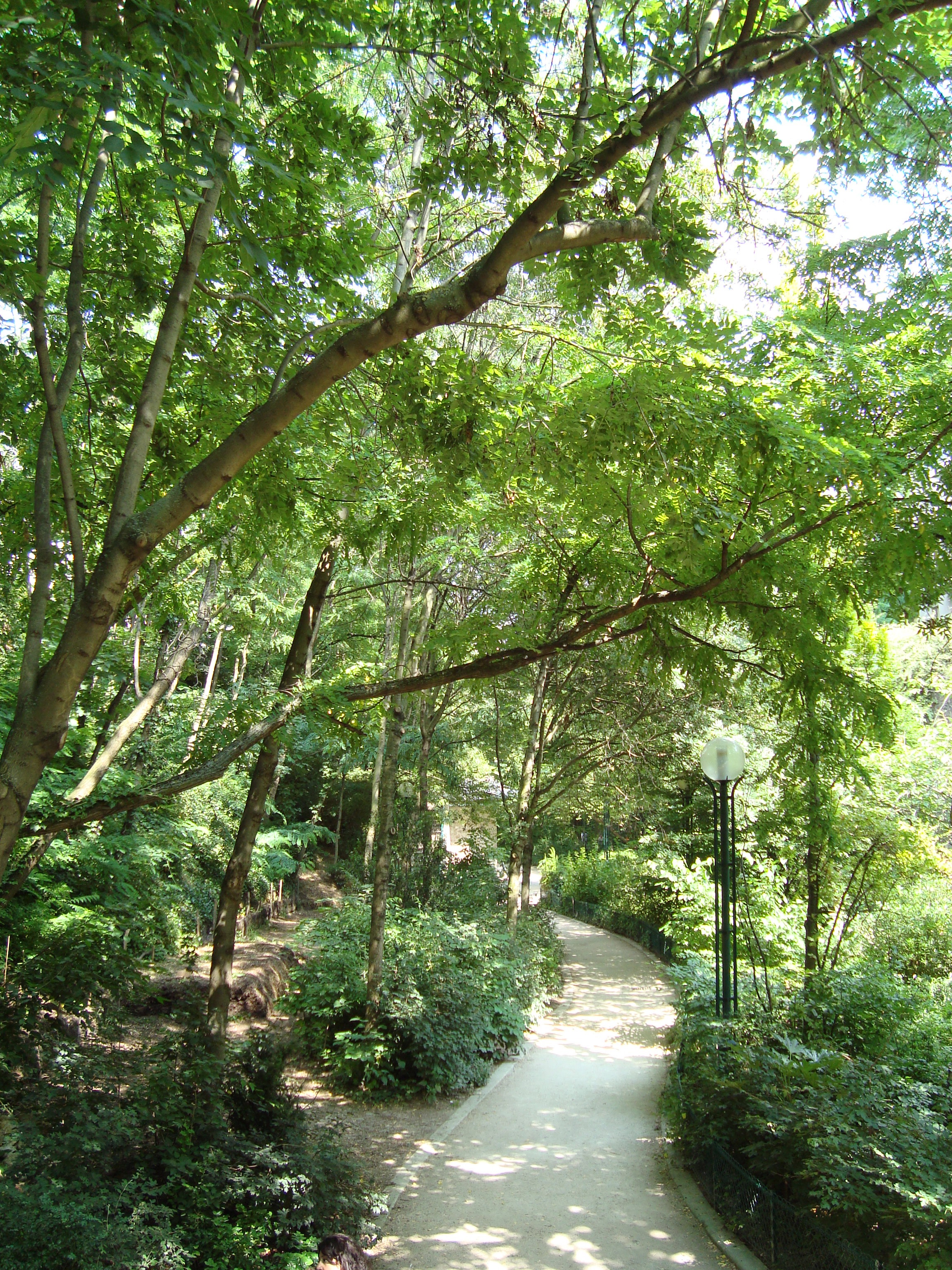 La promenade plantée dans le 12e arrondissement de Paris, au niveau de la rue de Picpus